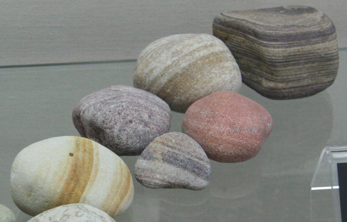 Sandsteine